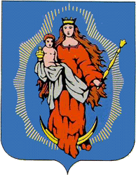 Herb miasta Łopatyn